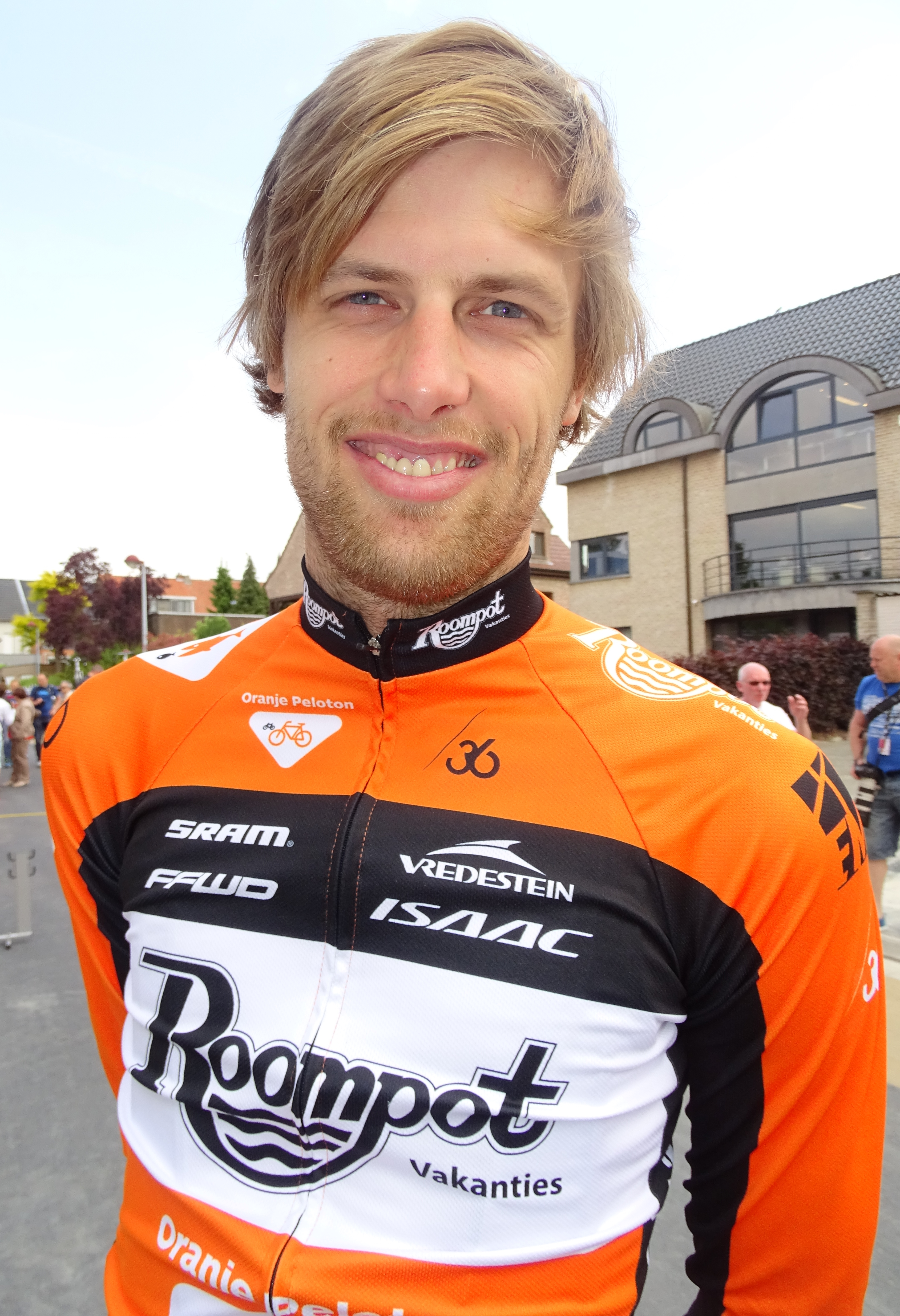 Reportage réalisé le mercredi 27 mai à l'occasion du prologue du Tour de Belgique 2015 à Bornem, Belgique.